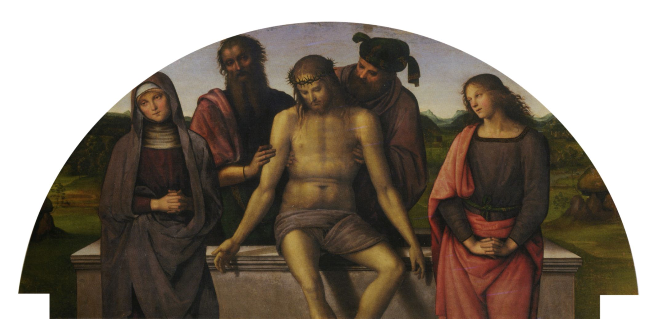 Pietro Perugino: Pala di Fano (Cristo sul sarcofago tra la Vergine, San Giuseppe d’Arimatea, Nicodemo e San Giovanni). Cat. no. 45 in Vittoria Garibaldi: Perugino. Catalogo completo. Octavo, Firenze 2000, ISBN 88-8030-091-1